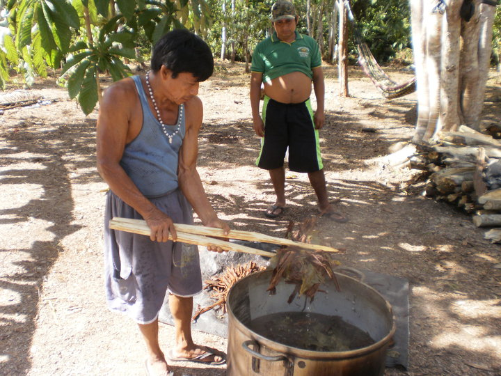 LA PREPARACION DE LA AYAHUASCA